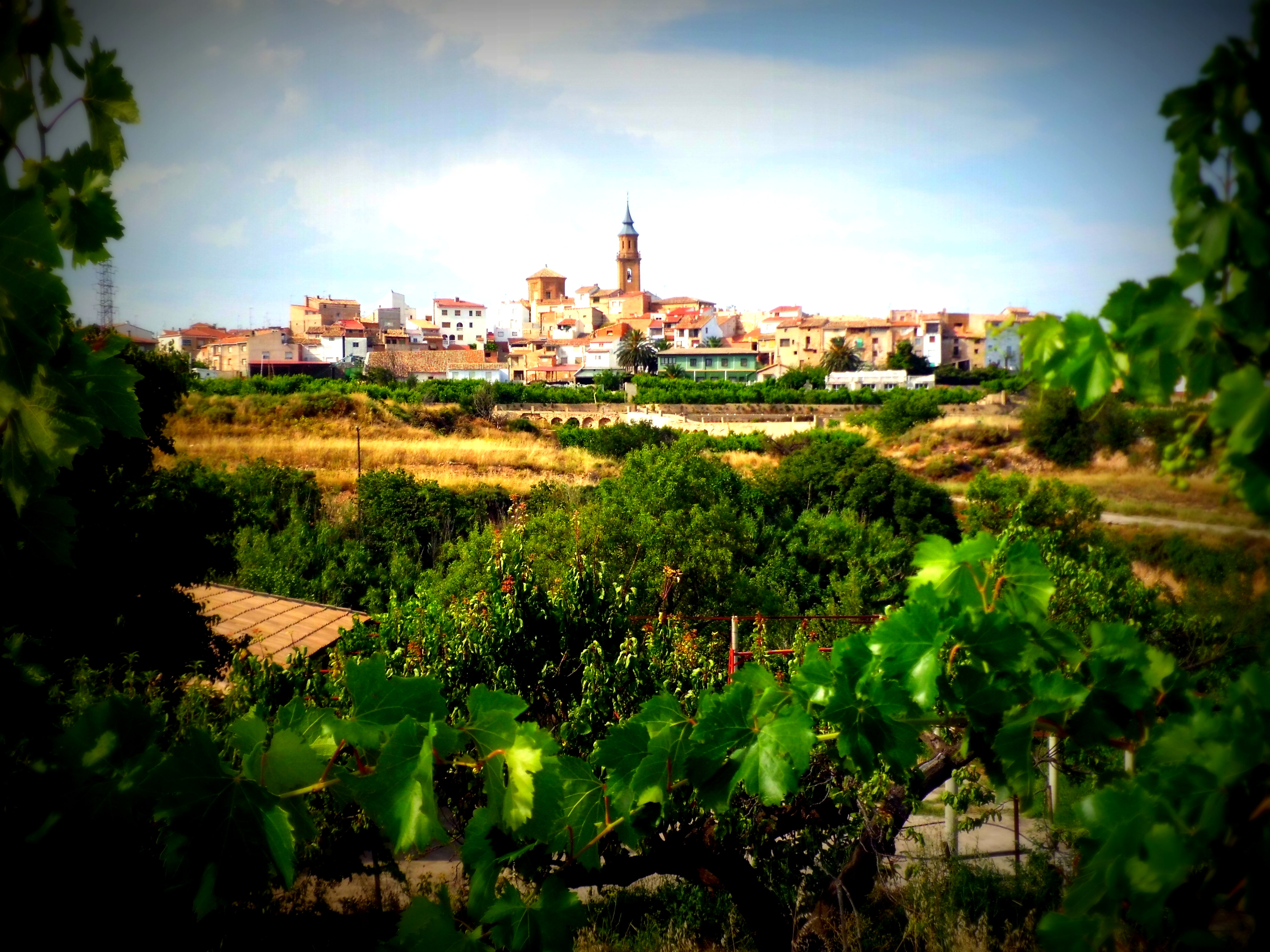 Vista parcial de Calanda (Teruel)